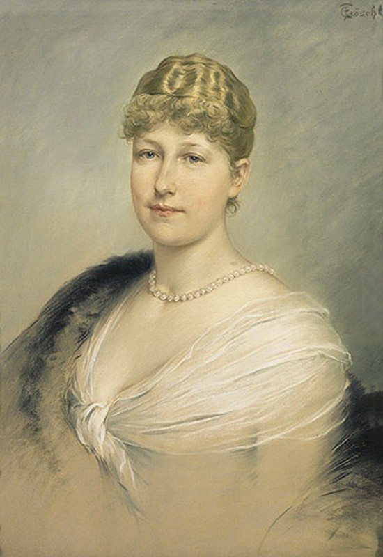 Carl Fröschl: Portrait der Kronprinzessin Stephanie von Habsburg, Gattin von Kronprinz Rudolf